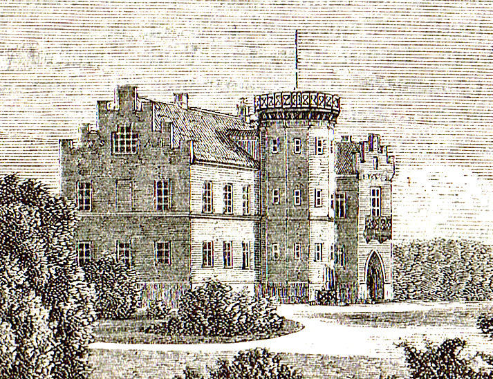 Steensgård oprindeligt Krogagergaard; i tidens løb blev den til den anselige Hovedgård Steensgård, Krogager nævnes første gang i 1442. Navnet Steensgård er fra 1577. Gården ligger på en bakke med en pragtfuld udsigt over havet, og ligger i Snøde Sogn, Langelands Nørre Herred, Tranekær Kommune. Hovedbygningen er opført i 1580-1585